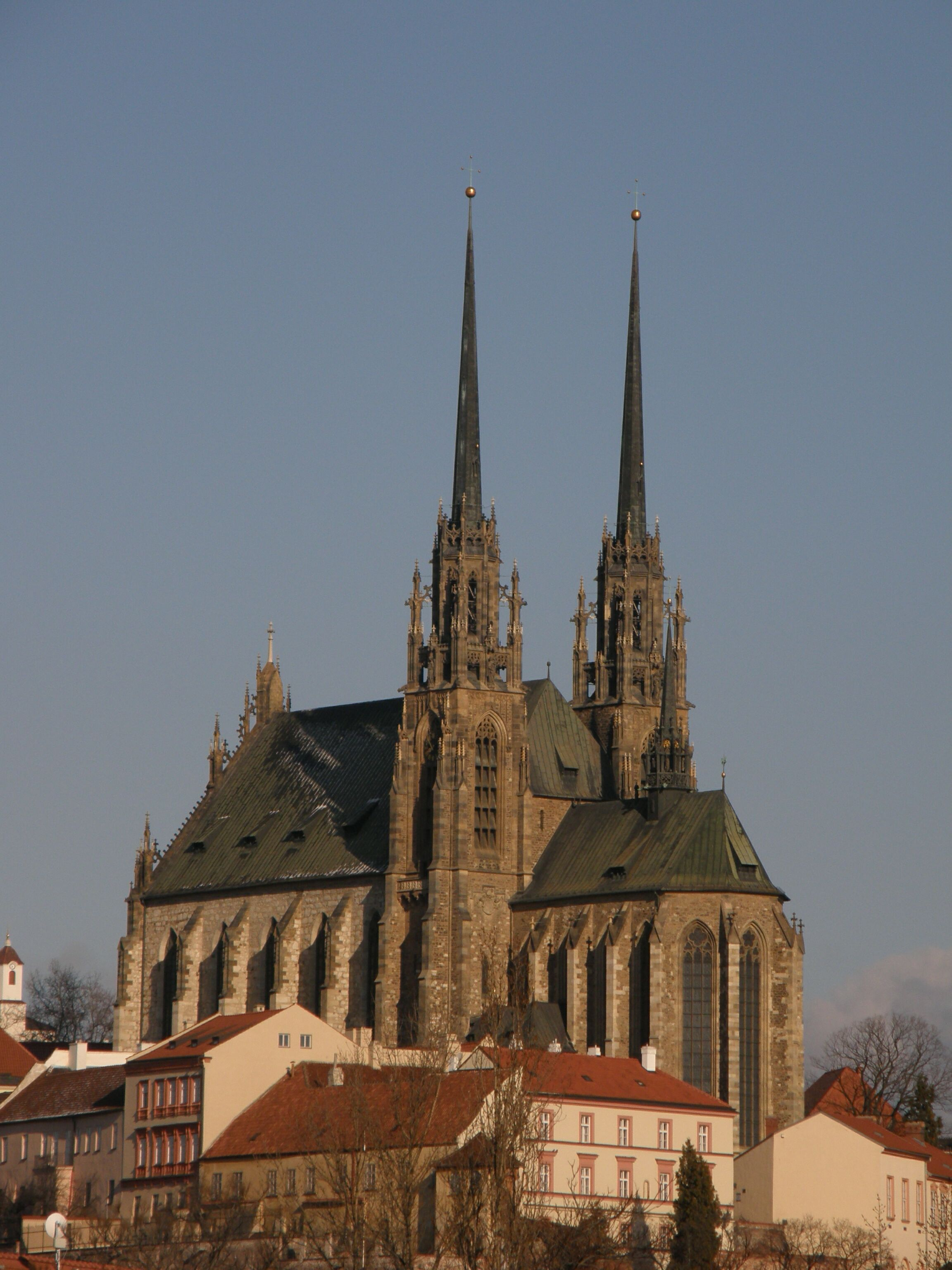 Katedrála svatého Petra a Pavla v Brně